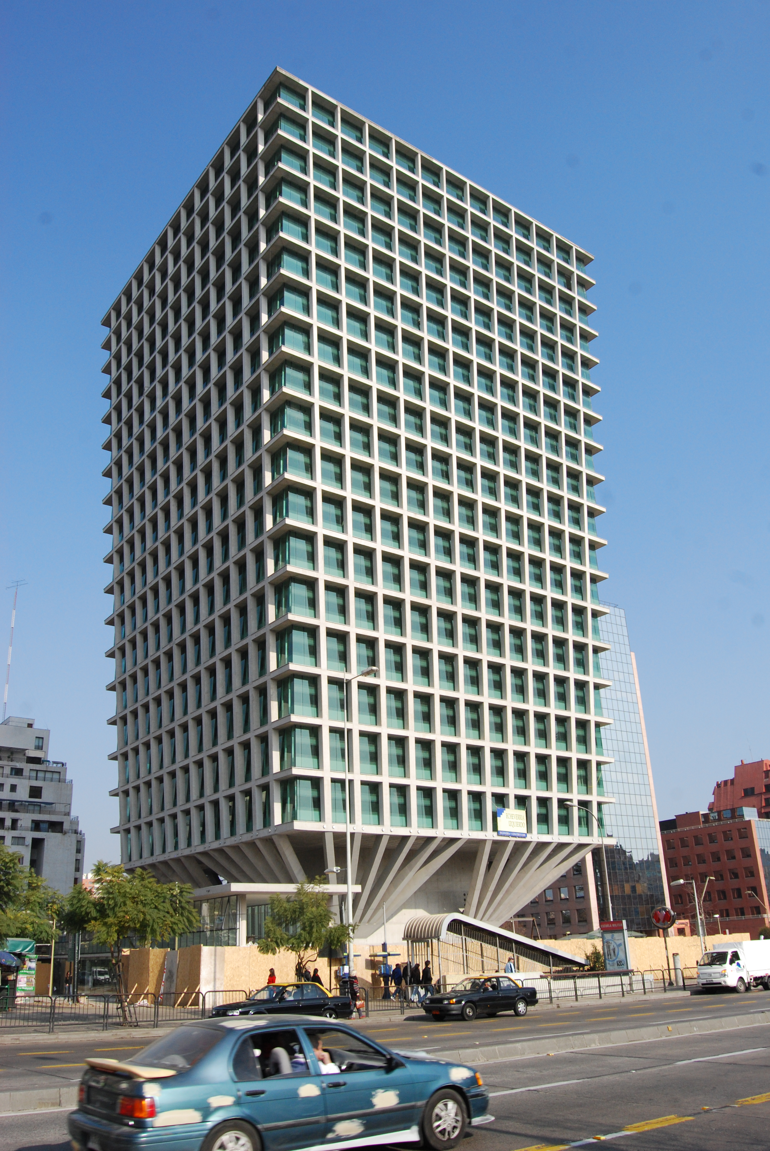 Avenida Apoquindo con Feliz de Amesti (frente a metro Escuela Militar), Santiago de Chile